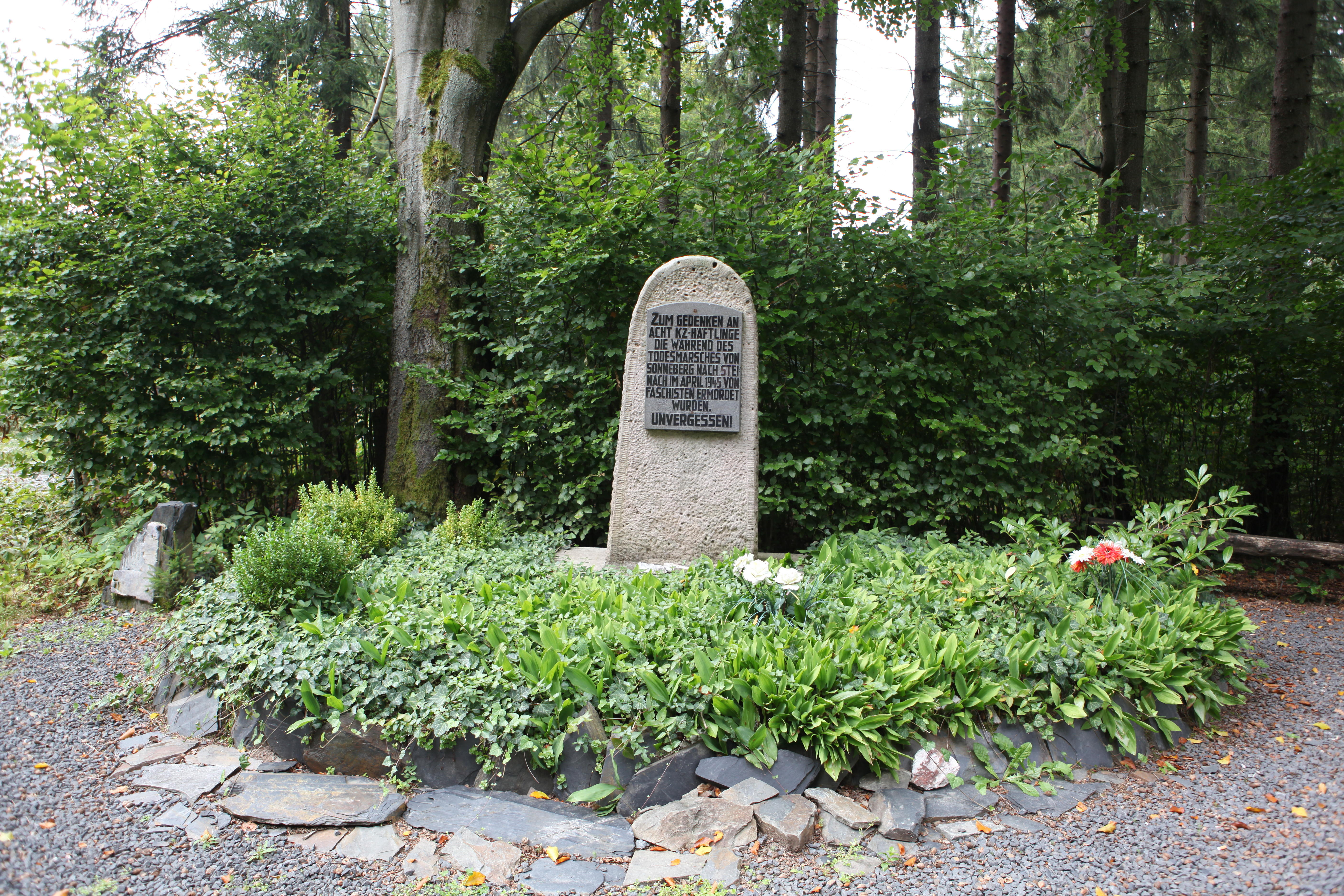 Gedenkstein Schustershieb, Steinach in Thüringen